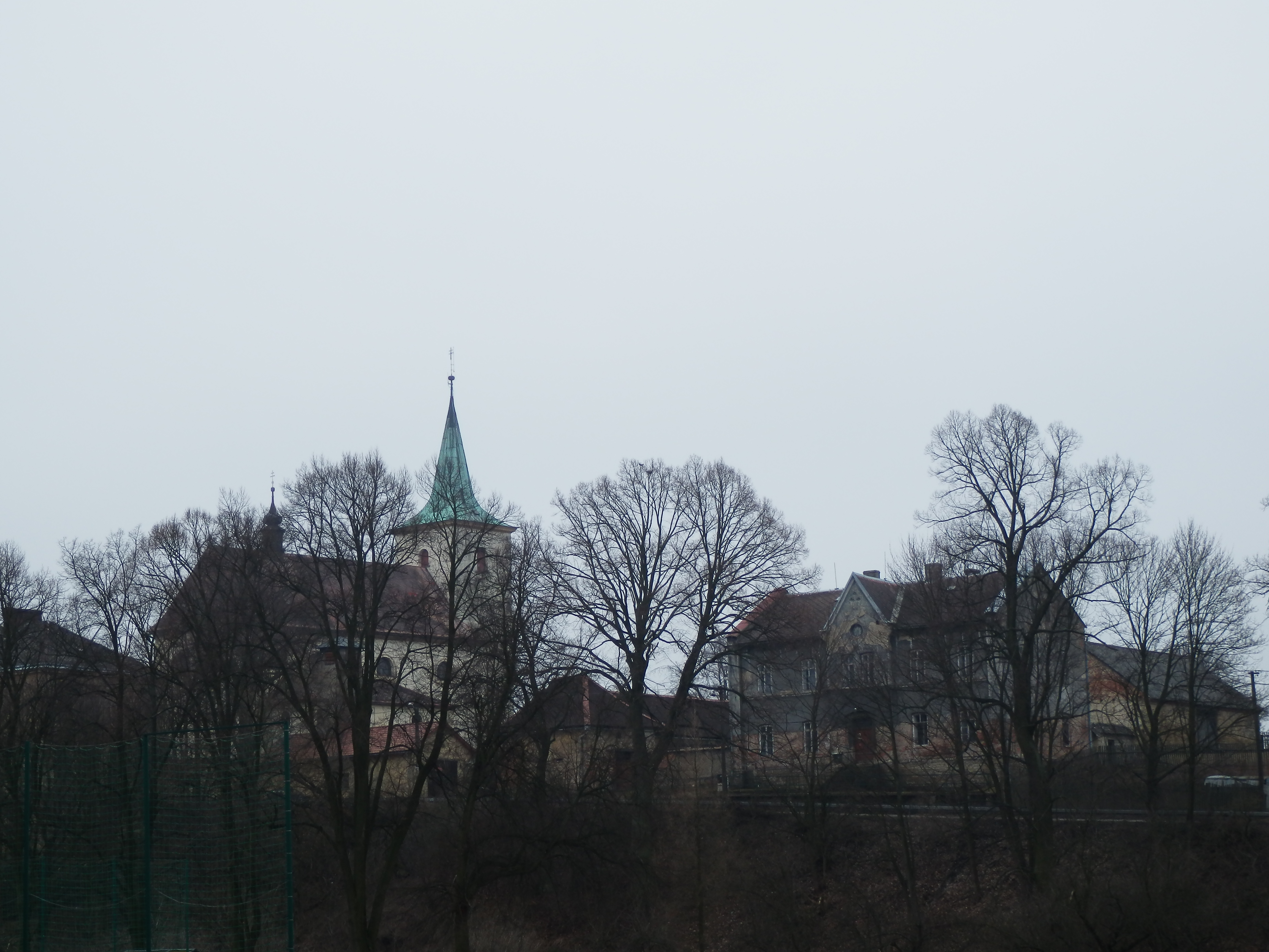 Kostel sv. Kateřiny (Hradec nad Svitavou), Hradec nad Svitavou